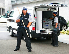 埼玉綜合警備保障による３号警備業務デモンストレーションの写真